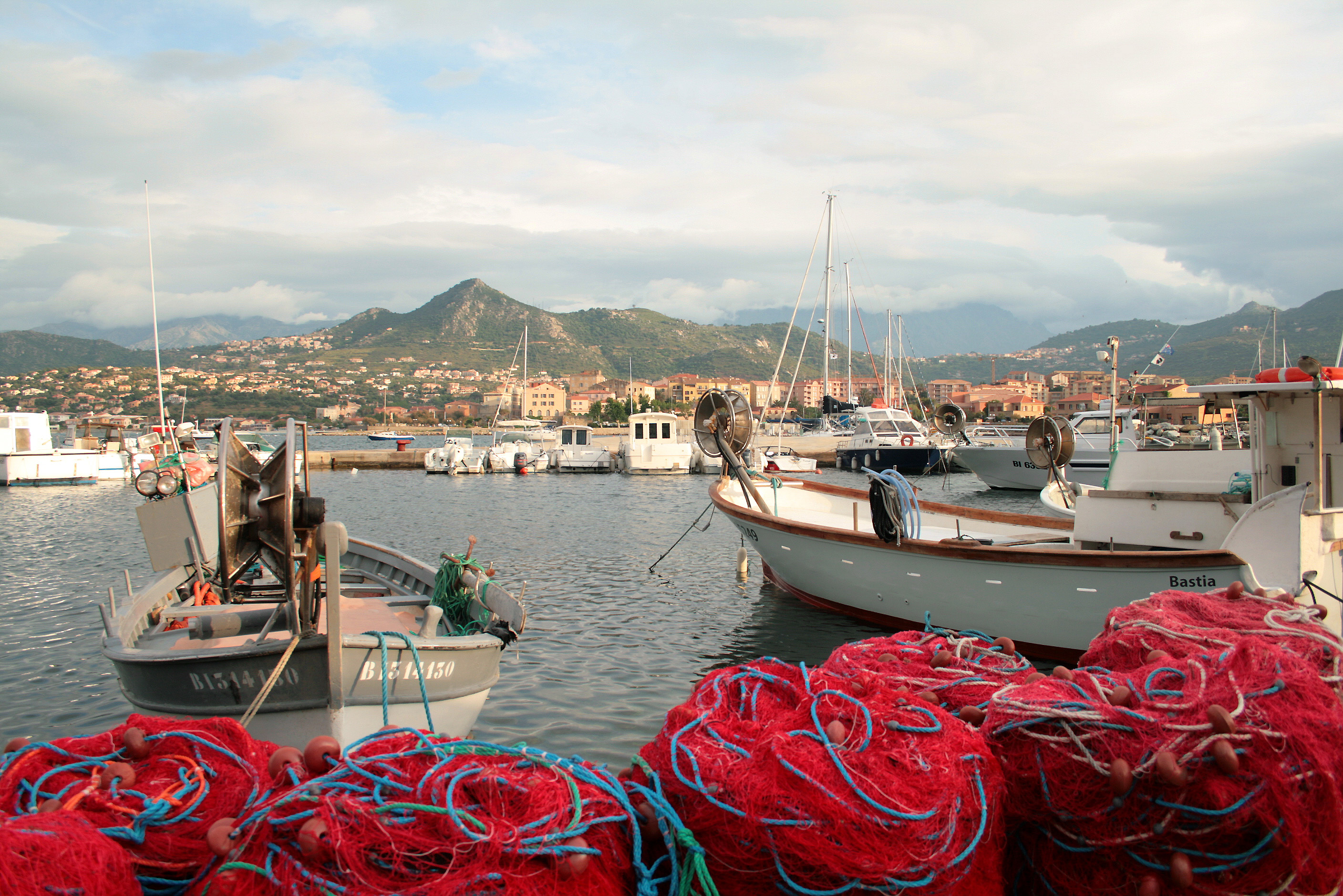 L'Île-Rousse - France - ( Haute-Corse), vue du port. Corsu: Isula Rossa Francia (Corsica suprana), u portu.